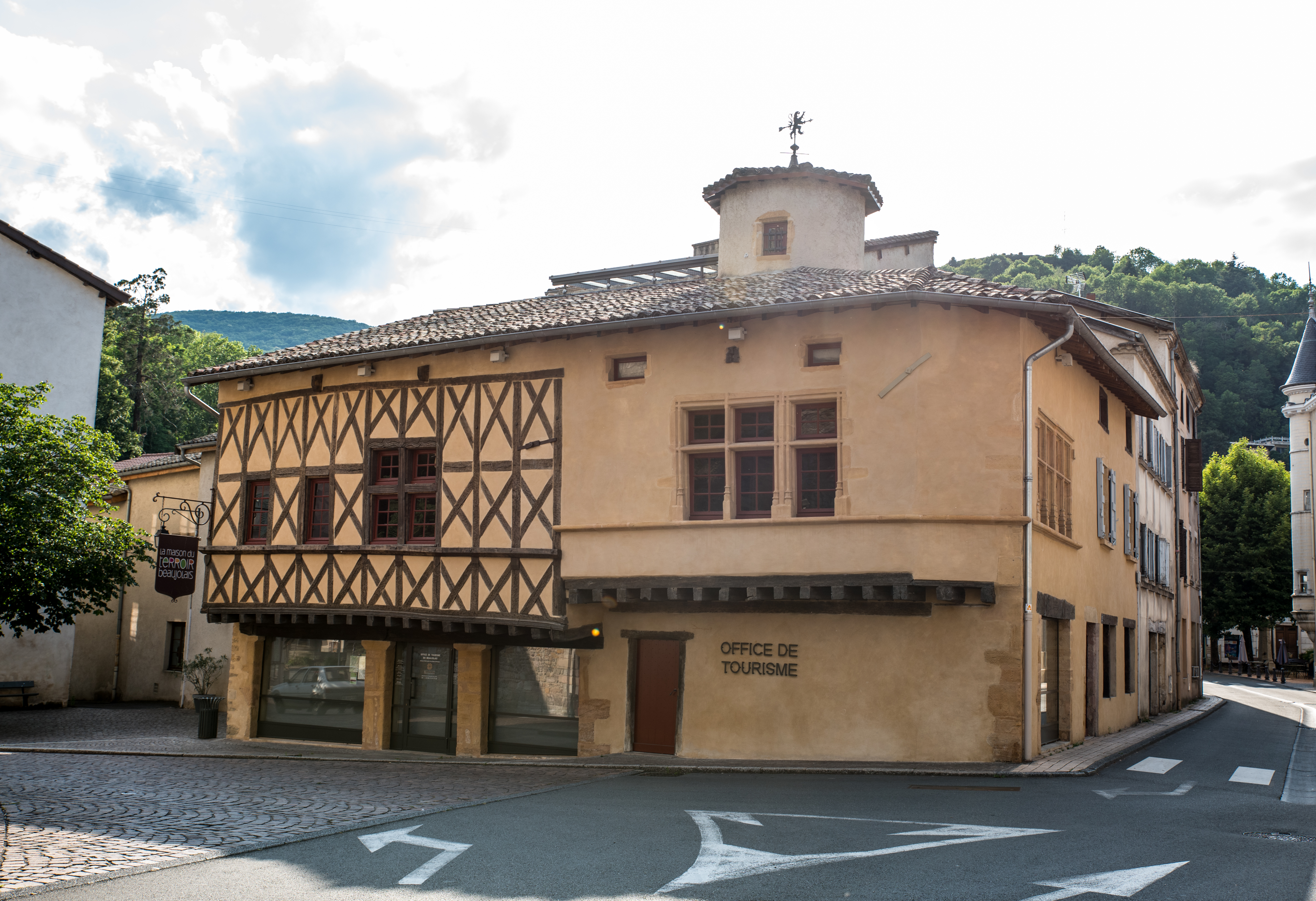 Maison à pans de bois de Beaujeu 2020 qui abrite l'office du tourisme et la maison du terroir beaujolais